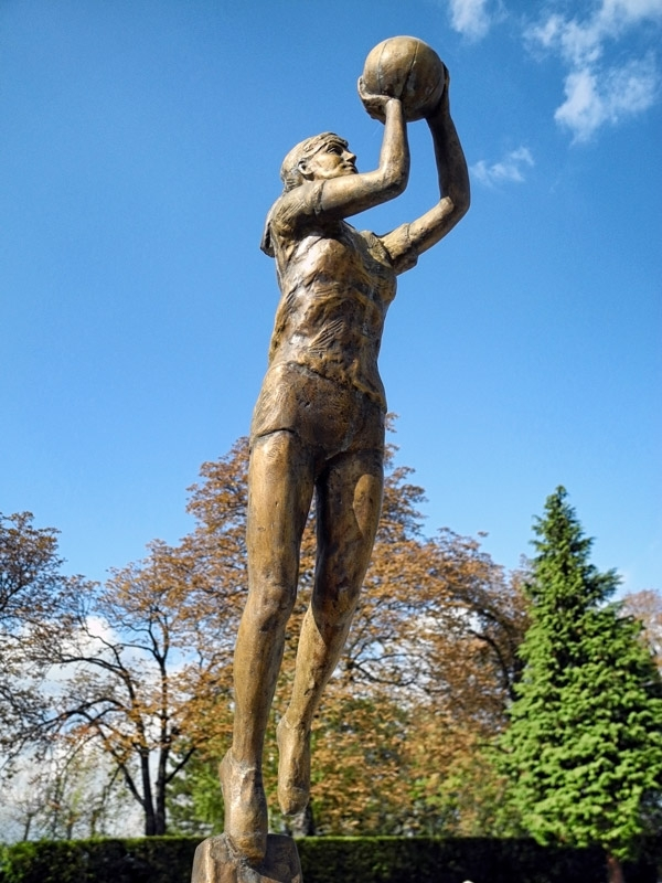 Kip Ružice Meglaj Rimac na Mirogoju. Autor Mikulin.